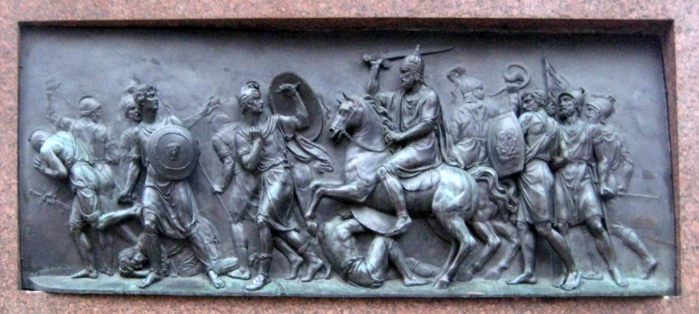 Памятник Минину и Пожарскому. Панно-рельеф на пьедестале